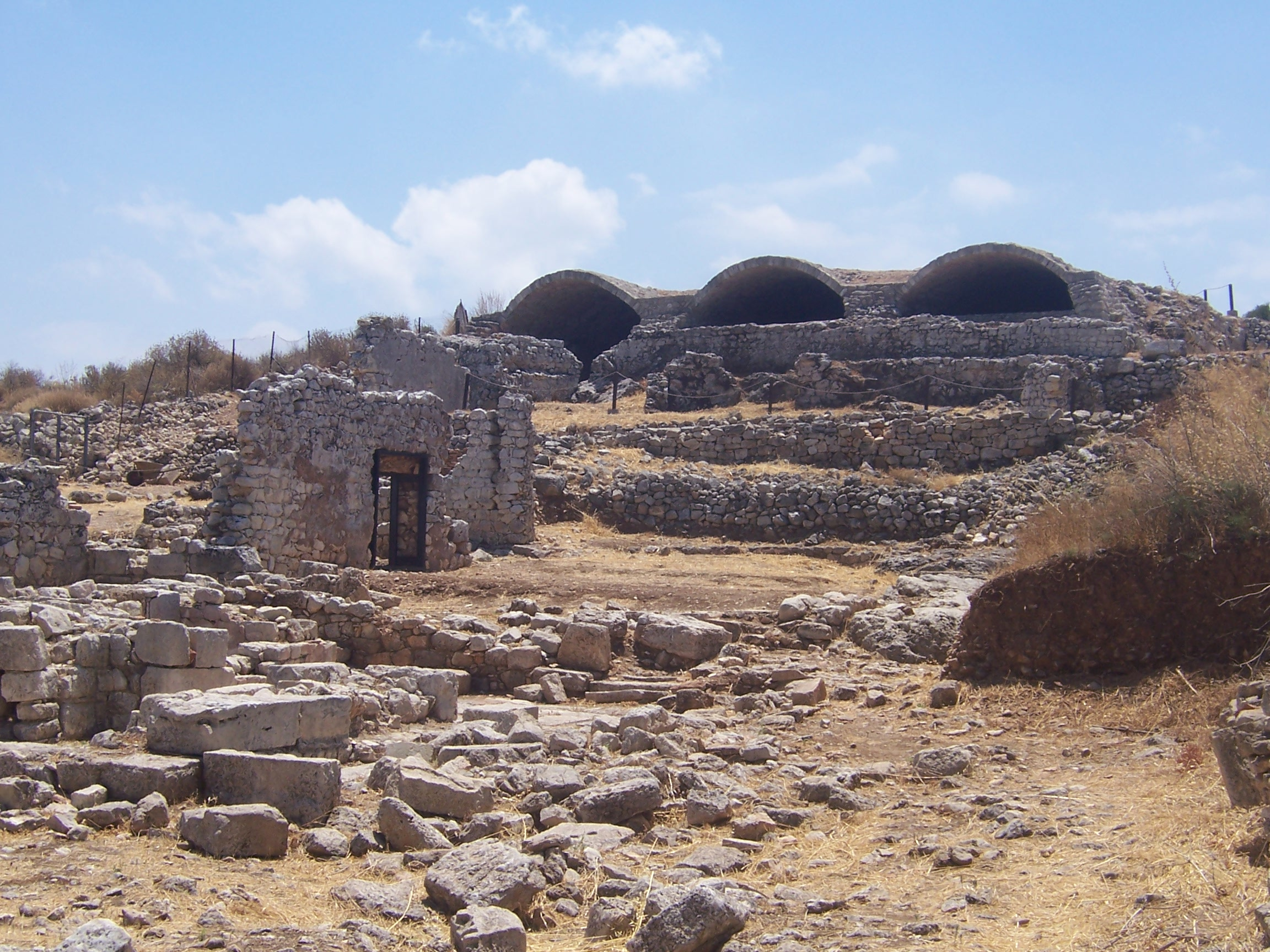 Bains et citernes romaines. Aptera (Crète)